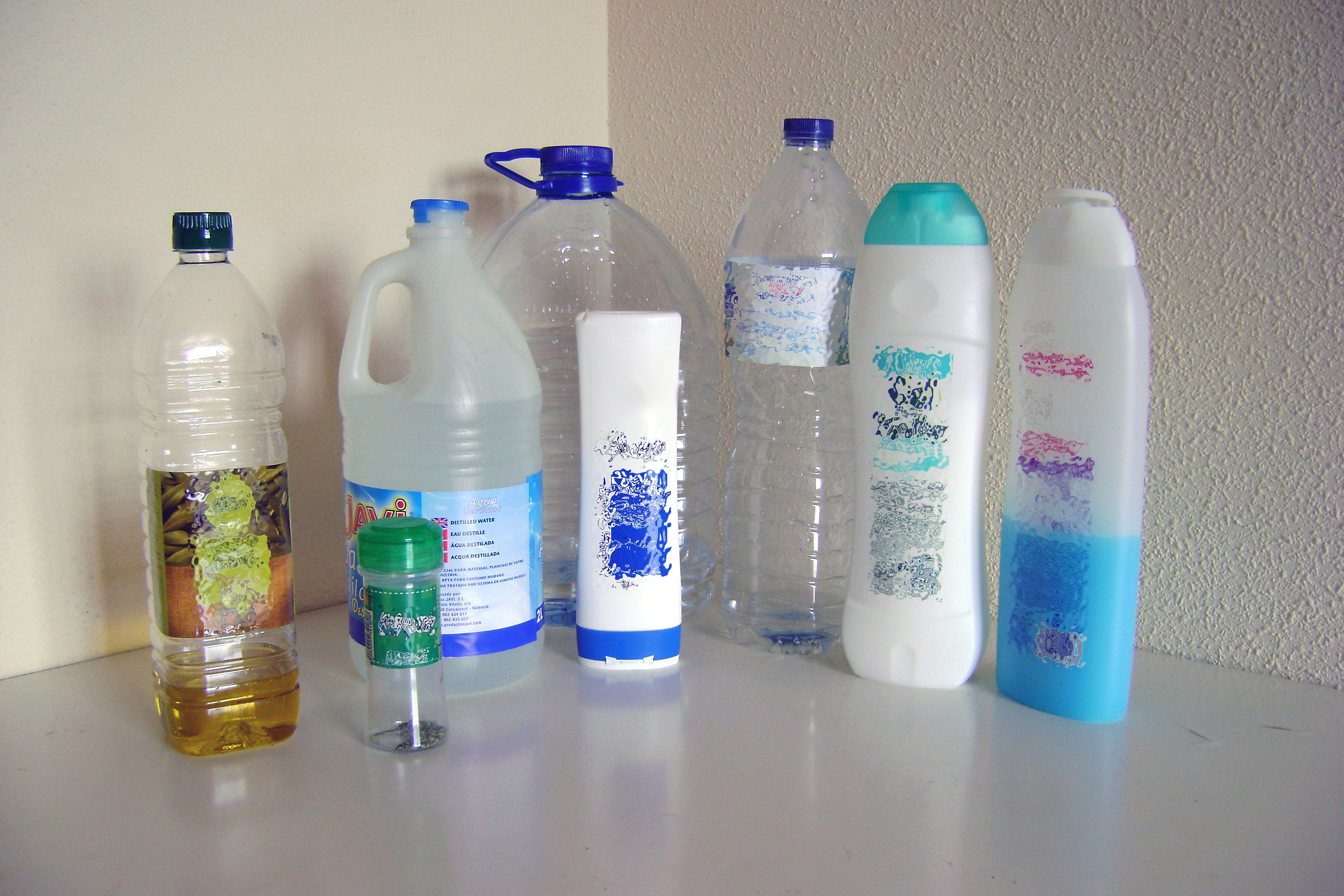 Un ejemplo de piezas conformadas por moldeo por soplado.